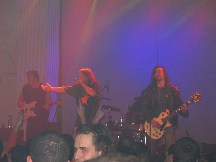 KUD Idijoti, Belgrade SKC